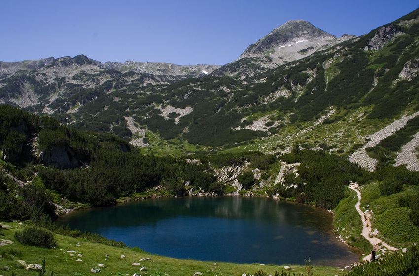 ез.Окото-Пирин